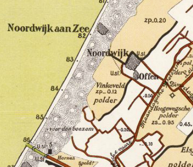 Vinkeveld polder